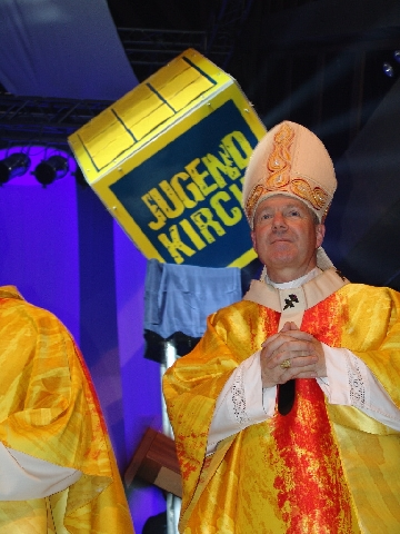 Christoph Kardinal Schönborn beim Eröffnungsgottesdienst der Jugendkirche Wien (9.10.2005)